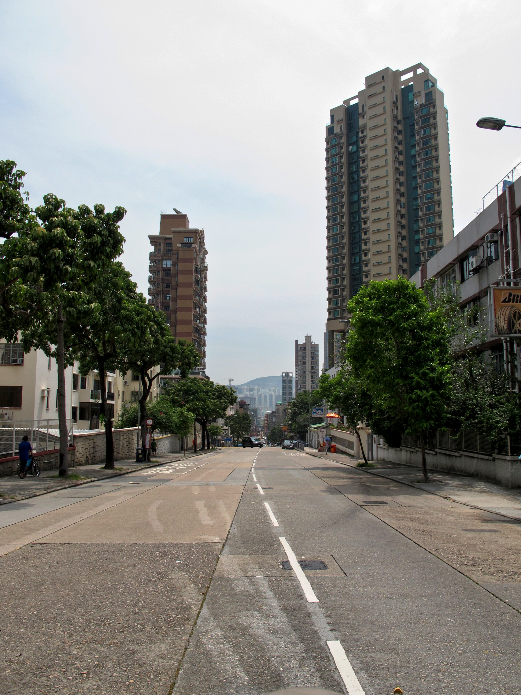 Nga Tsin Wai Road 衙前圍道